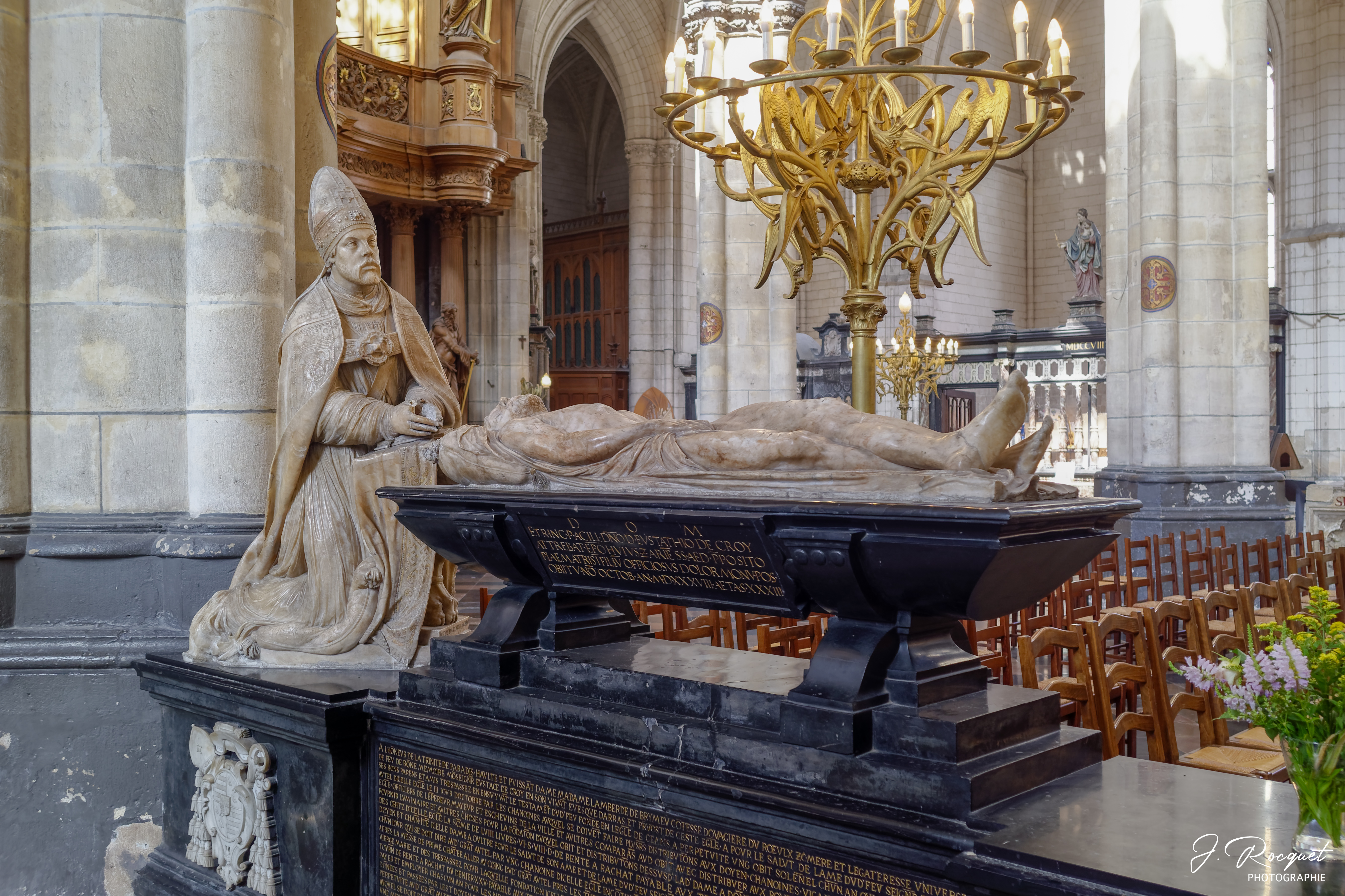 Mausolé d'Eustache de Croÿ Chanoine de Cambrai et évêque d'arras. La sculpture est attribuée à Jacques Du Brœucq.